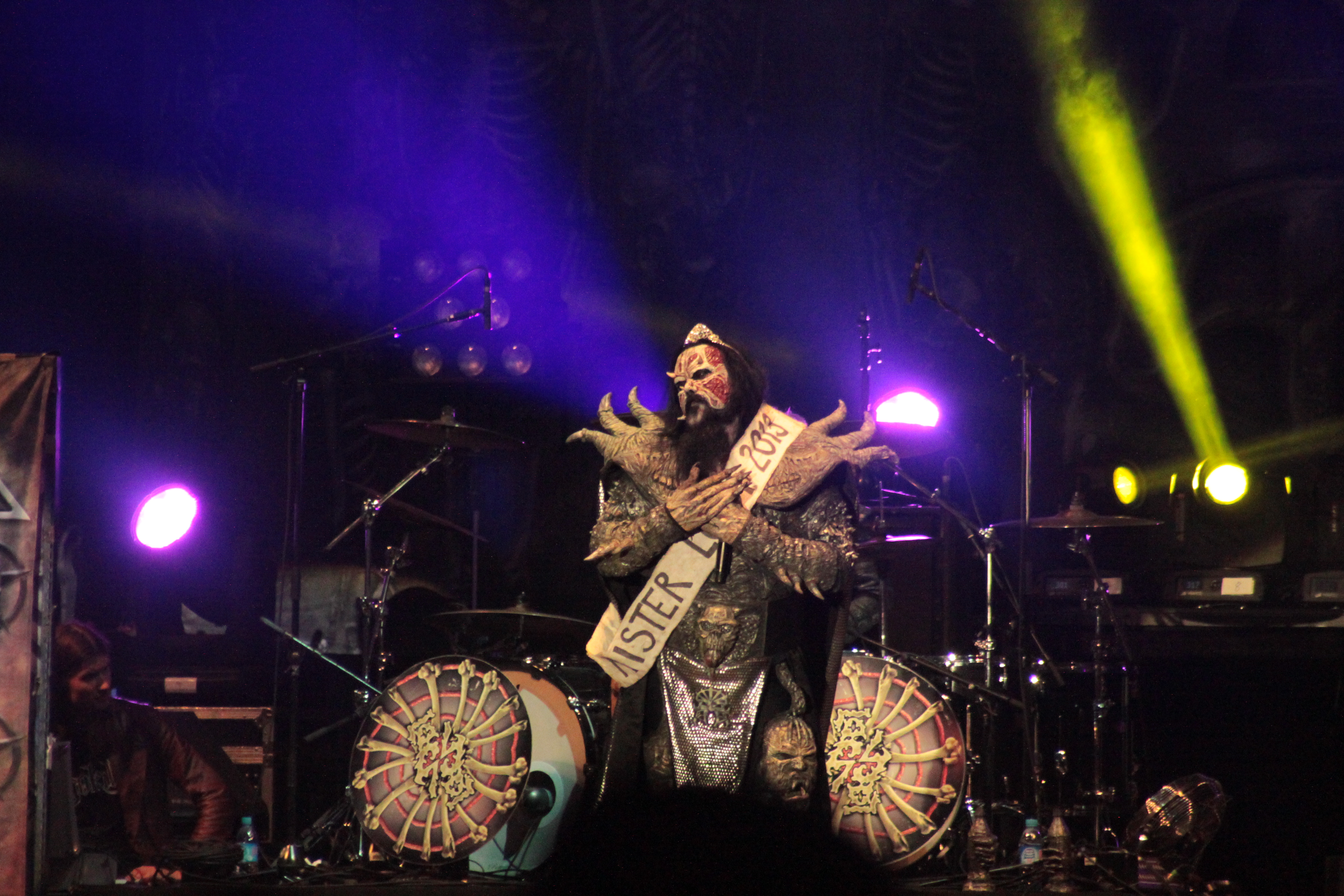 Mr Lordi, Lordi, Helfest 2013, Fr-44-Clisson.